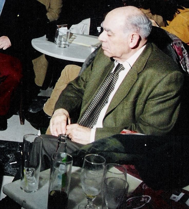 Víctor García de la Concha hablando en el Café Novelty de Salamanca en 1995. En la foto se ve al poeta Paco Novelty con pantalón granate, al escritor Manuel Fernández Álvarez de lado en primer plano y al fondo a la familia Novelty.